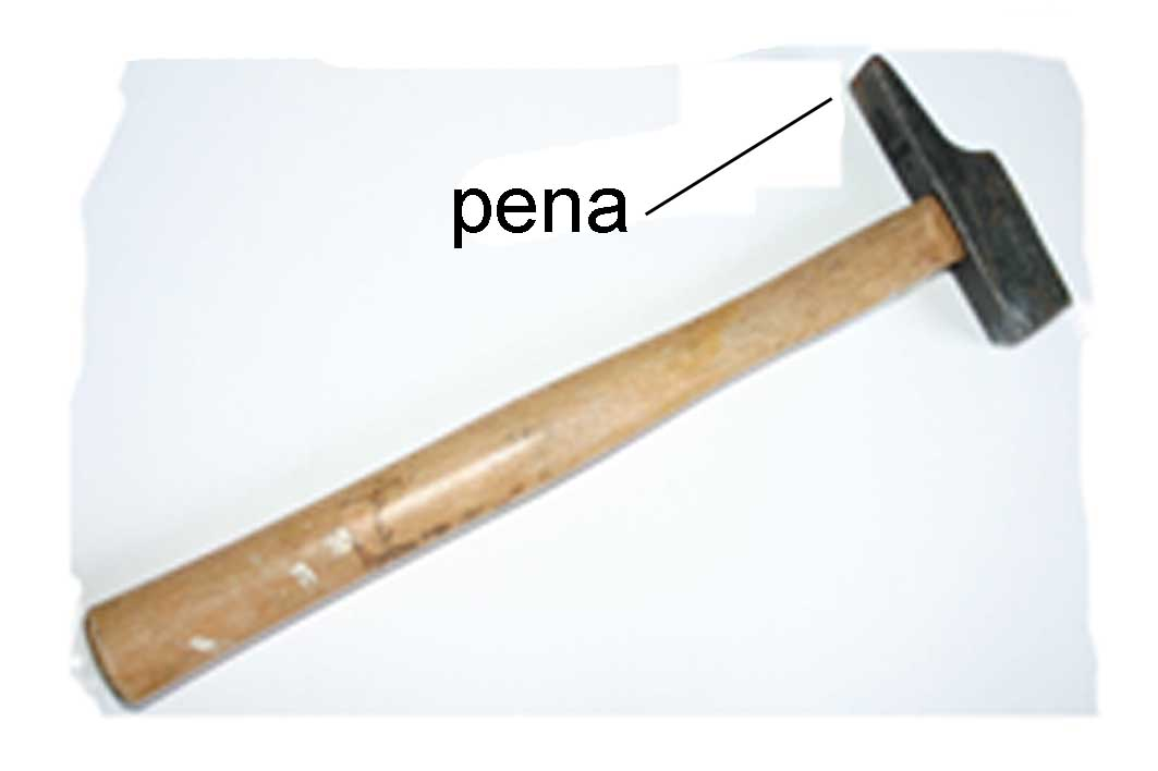 martell tradicional de fuster